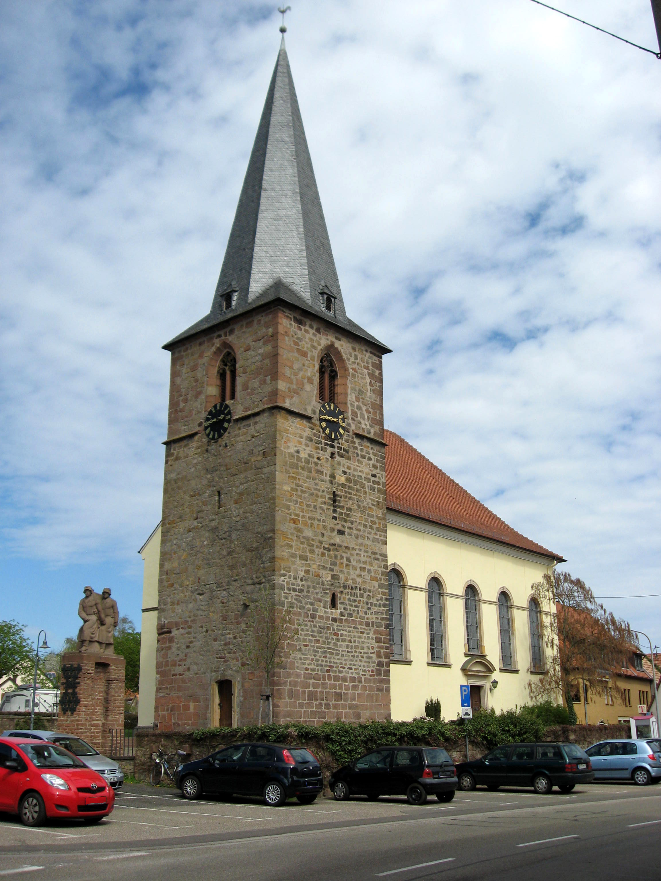 Protestanische Pfarrkirche in Godramstein